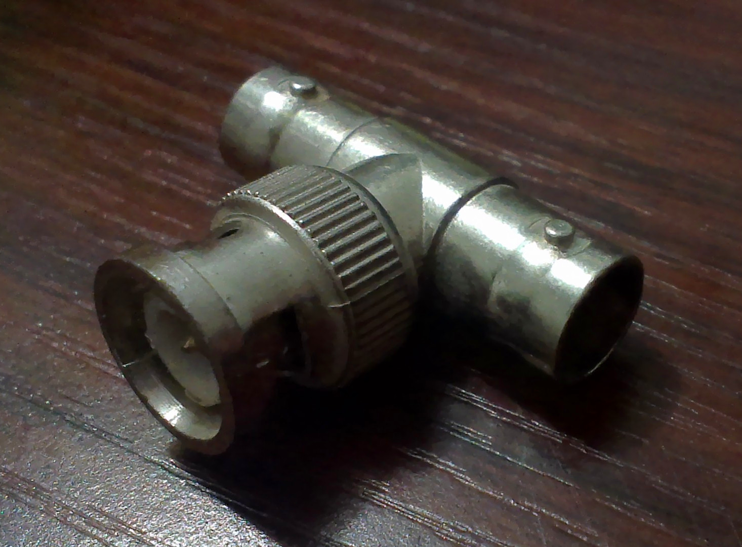 视频三通头